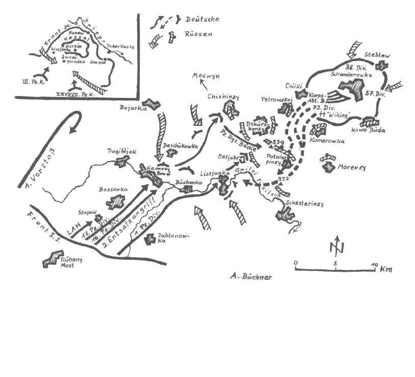 Прорыв немецких войск из Корсуньского котла